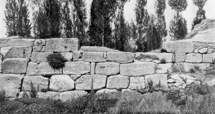 Van fortress